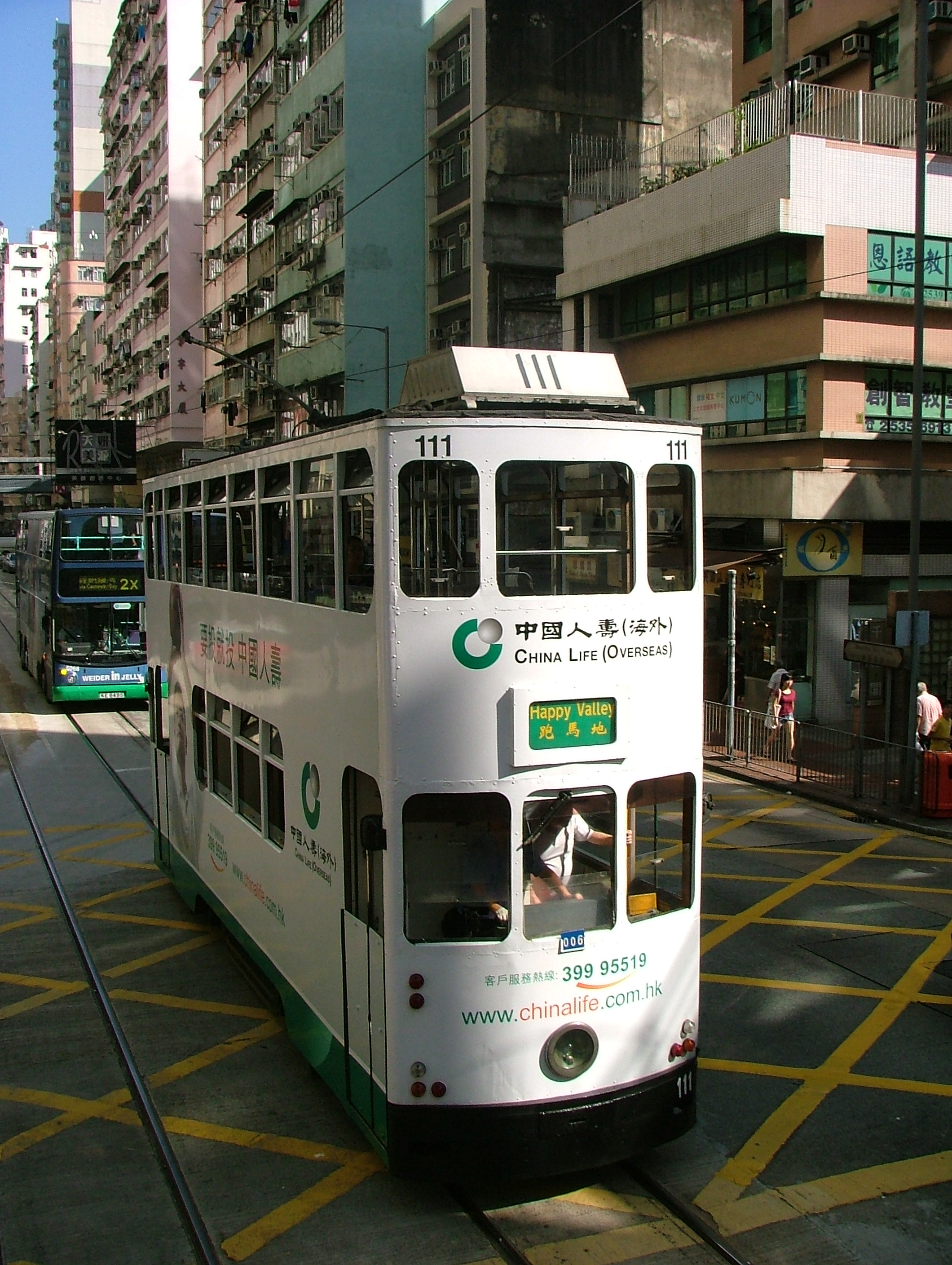 Wikimania HongKong